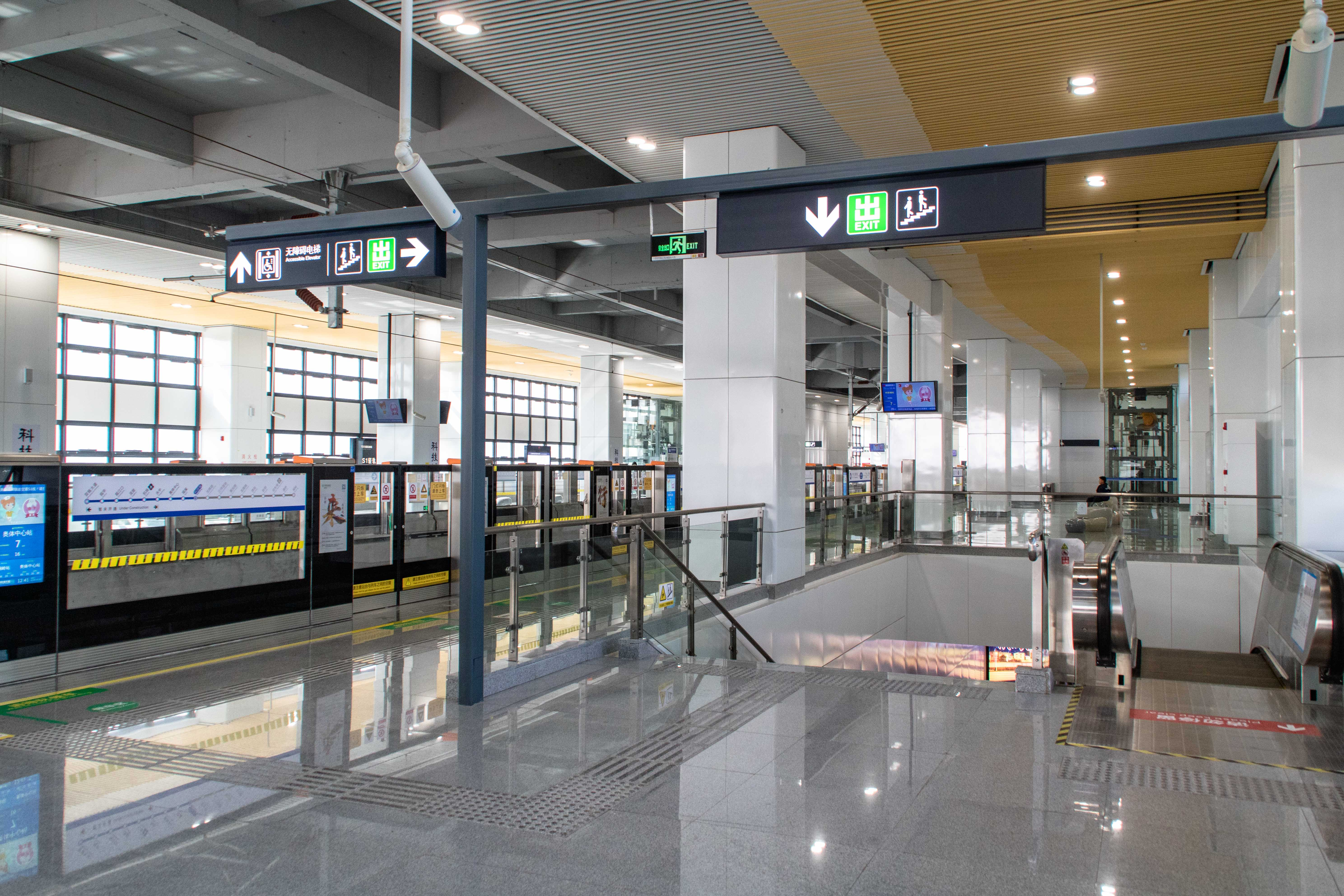 中文（中国大陆）: 科技城站站台